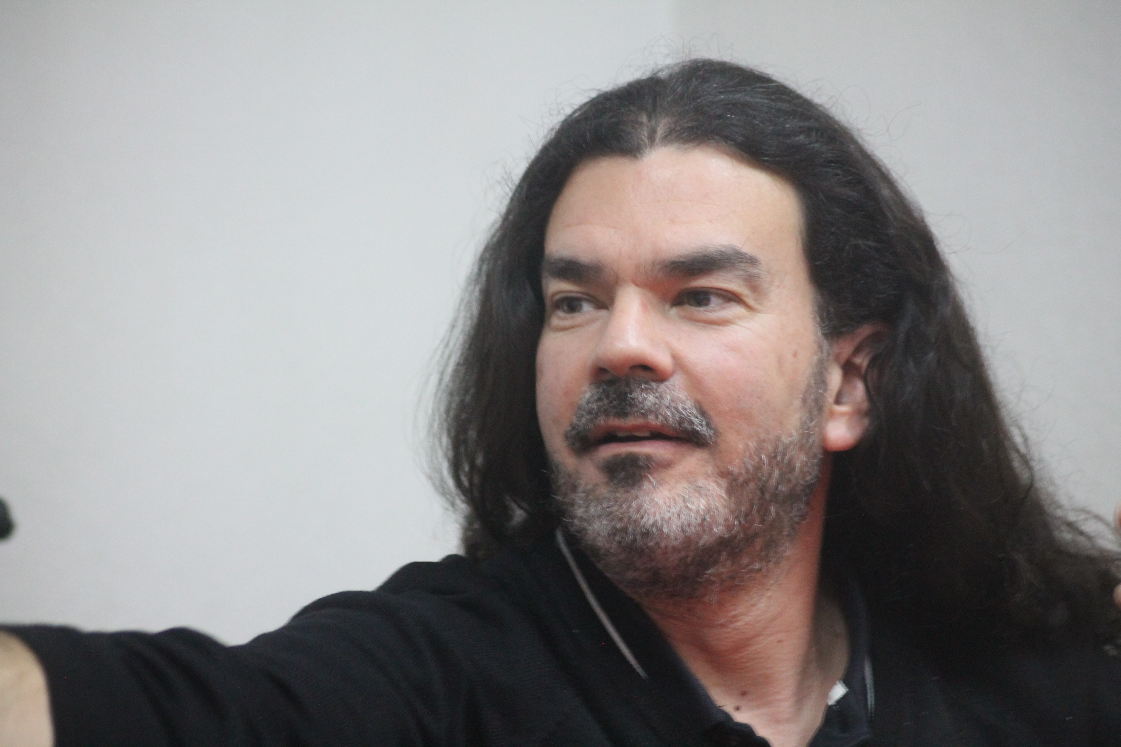 Escuela de Verano PCM